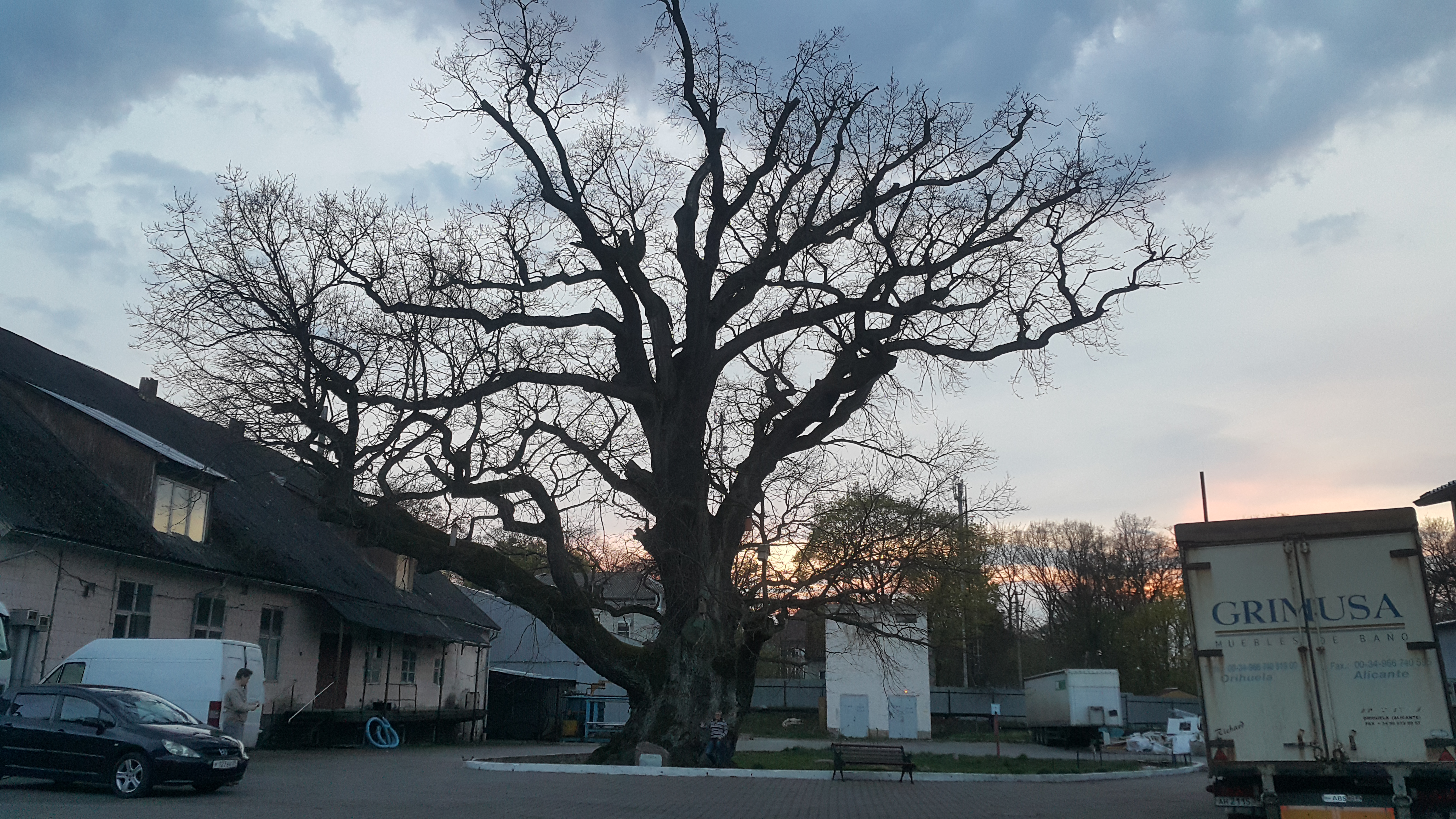 Дуб черешчатый,, Багратионовский район This image is related to the protected area of Russia number 3910007